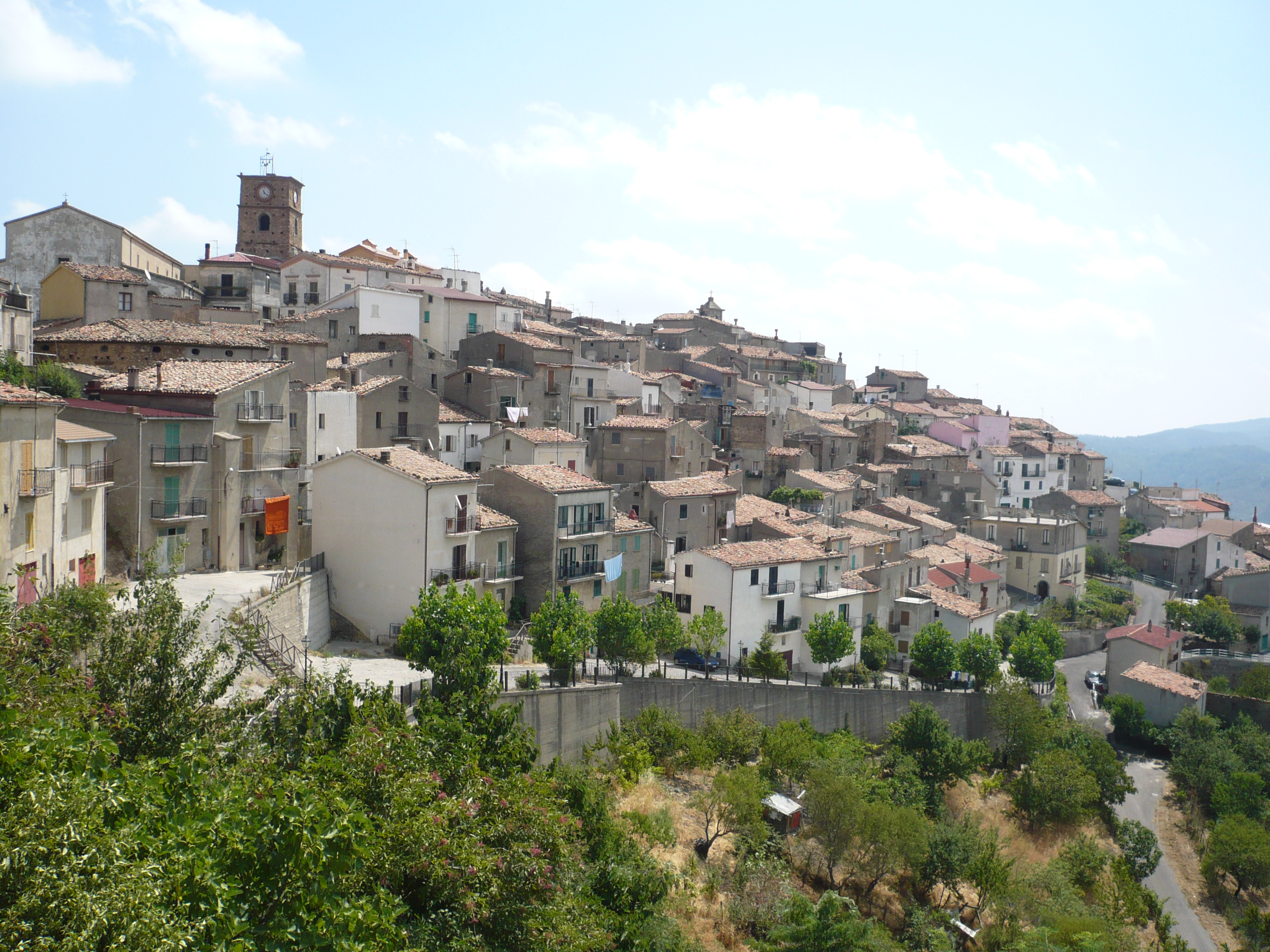 Vue de Bocchigliero